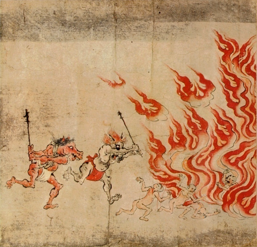 地狱绘草纸